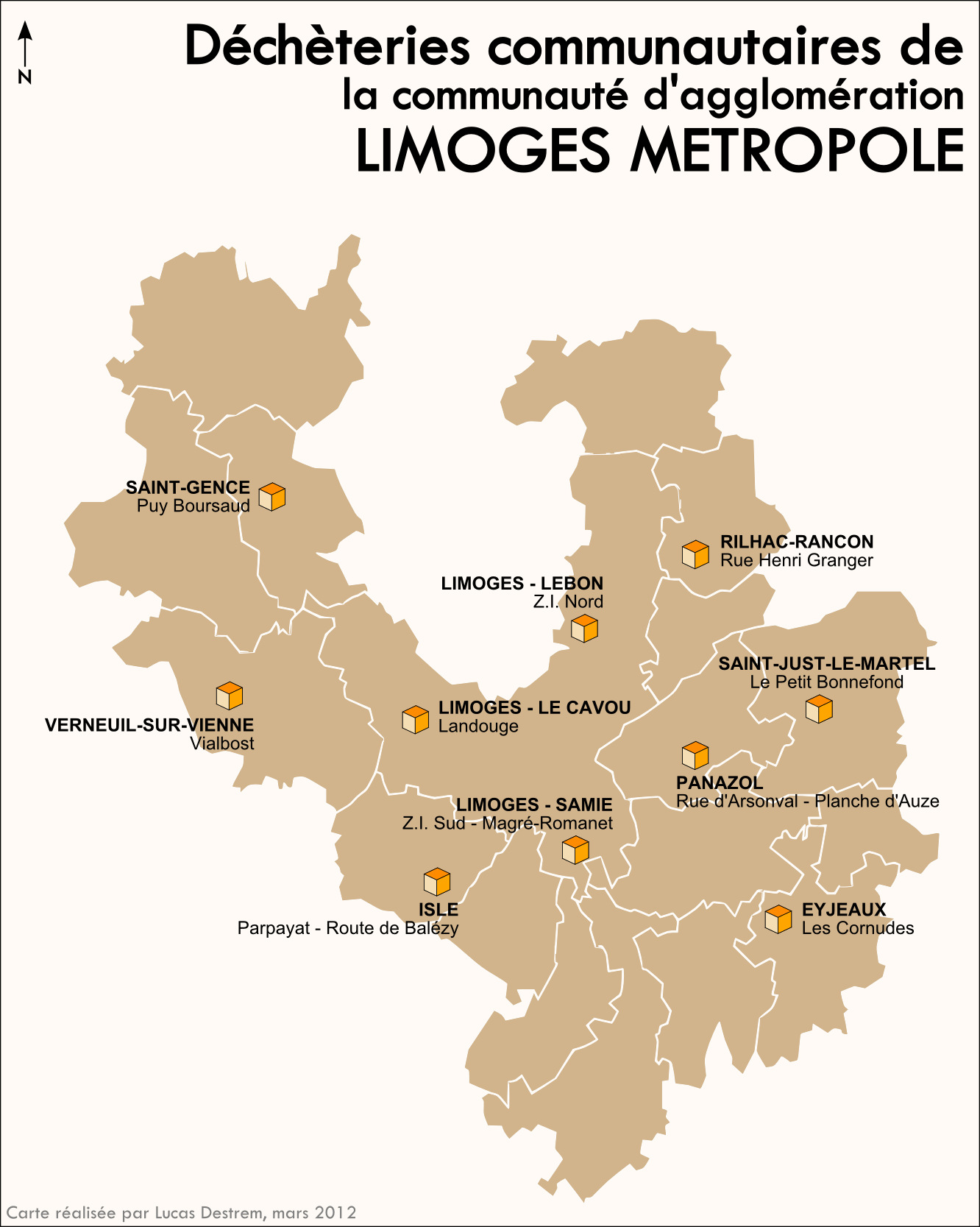 Carte des déchèteries communautaires de la communauté d'agglomération Limoges-Métropole.